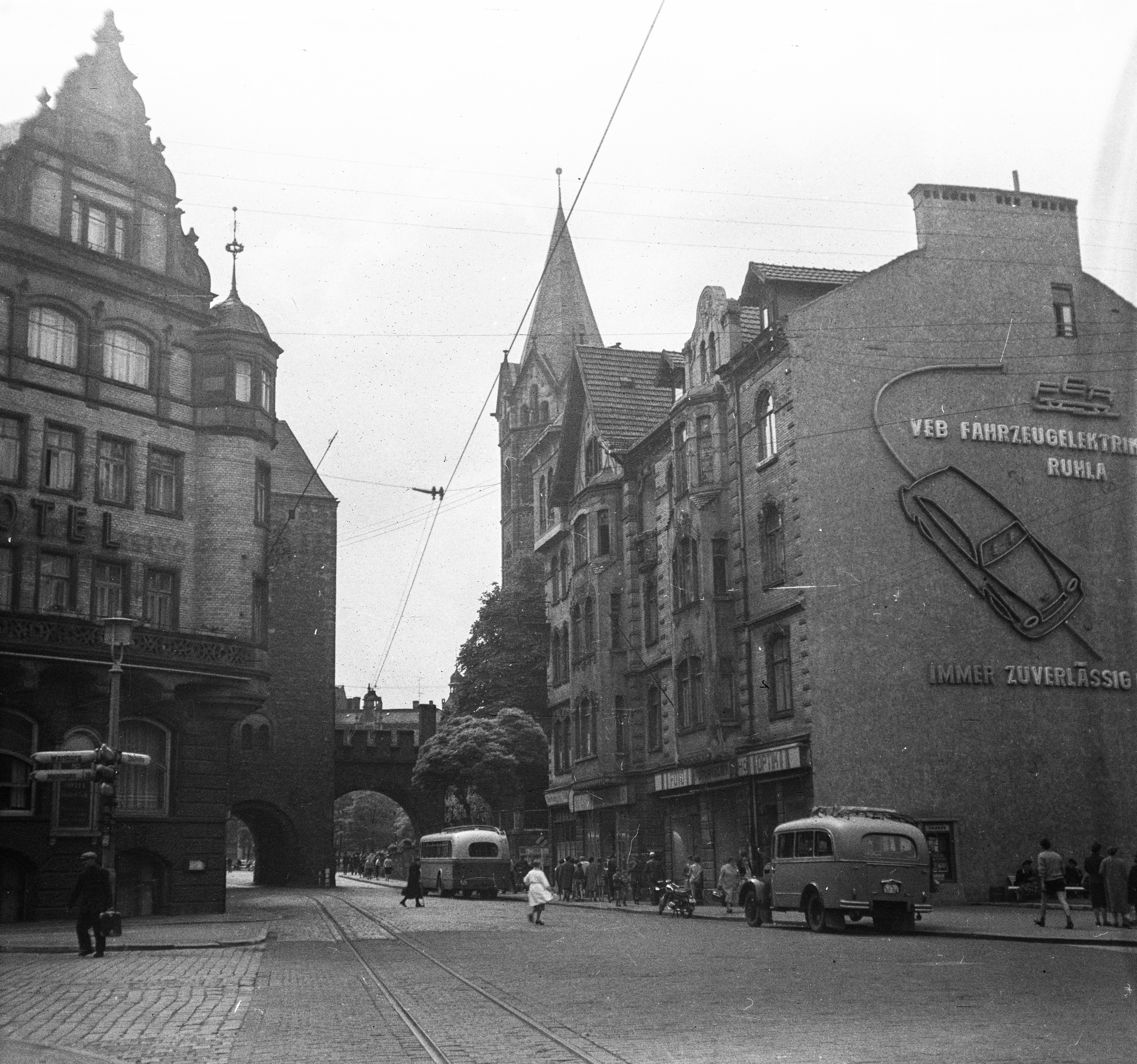 Bahnhofstrasse, szemben a Nikolaitor, ettől jobbra a Nikolaikirche tornya. A kapun túl a Karlsplatz. Location: Germany, Eisenach Tags: GDR, street view, genre painting, bus, motorcycle, lamp post, ad Title: Bahnhofstrasse, szemben a Nikolaitor, ettől jobbra a Nikolaikirche tornya. A kapun túl a Karlsplatz.